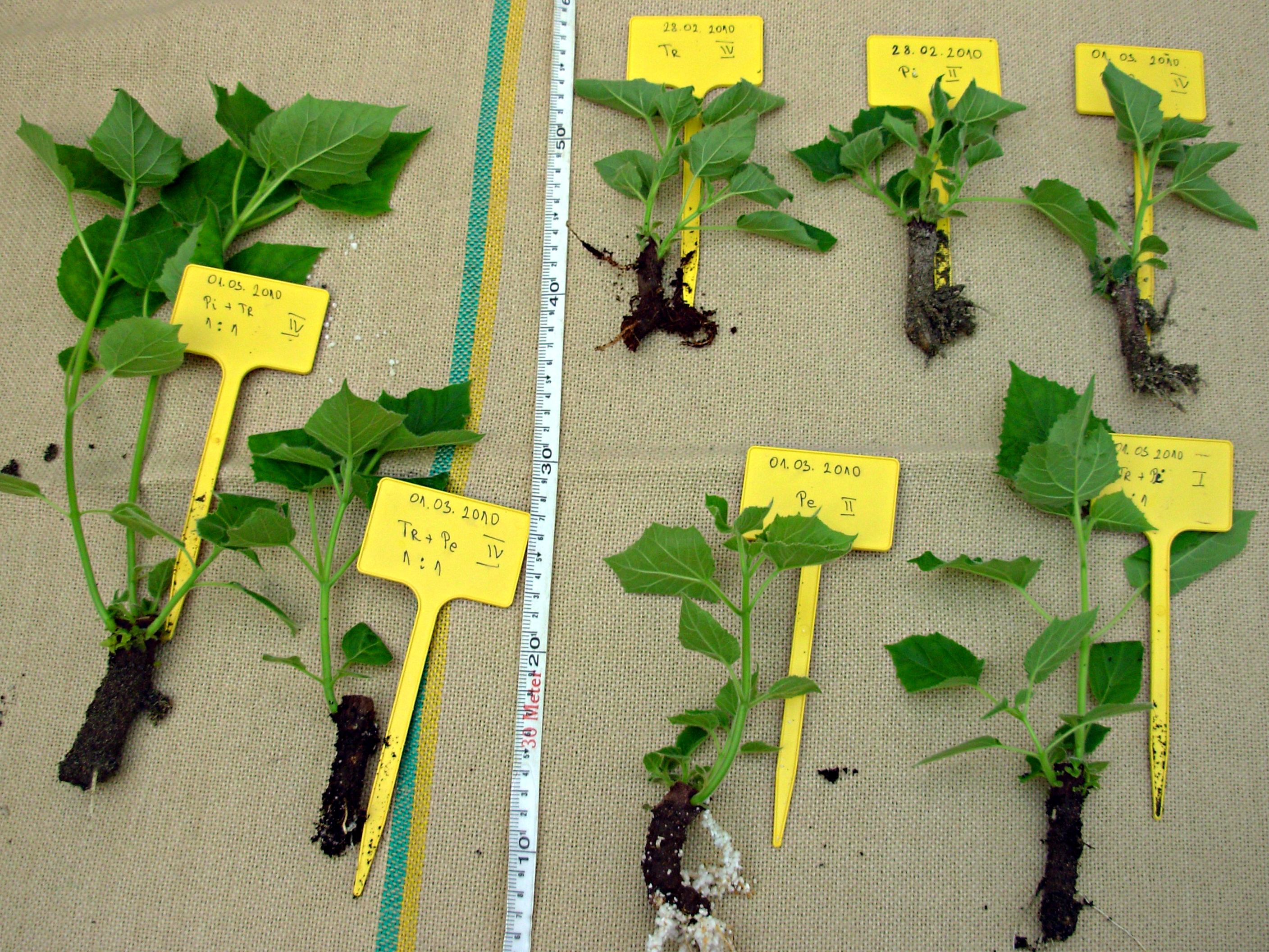 Регенерисане коренске резнице Paulownia fortunei у расаднику „Екоплант“, Подгорица (аутор: Жељко Видаковић).